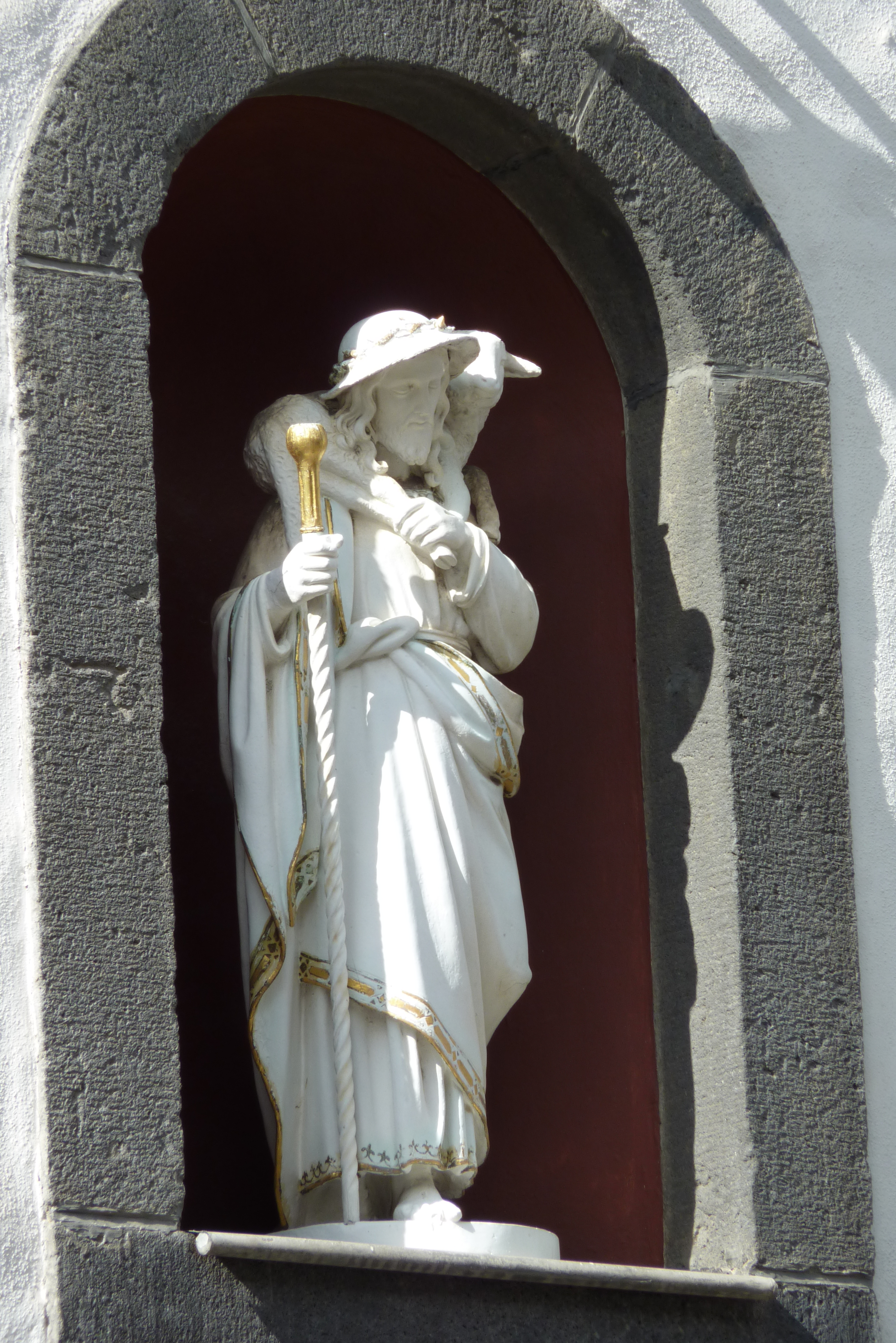 Guter Hirte über dem Eingang der Kapelle St. Josef in Walporzheim, Stadtteil von Bad Neuenahr-Ahrweiler